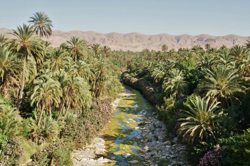 El Kantara